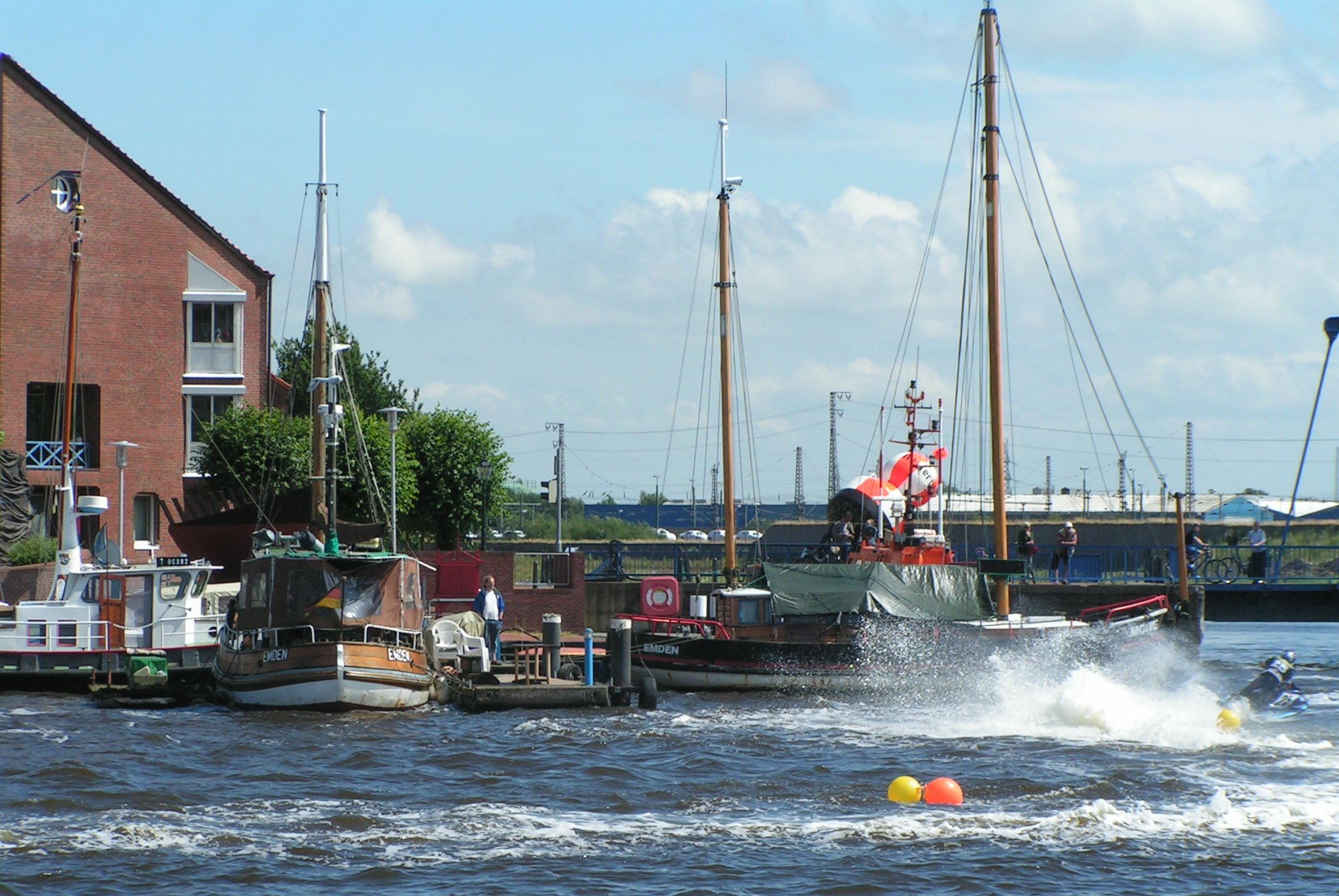 Teilnehmer an der Deutschen Meisterschaft des Deutschen Jetsport-Vereins in Emden während des Delftfestes 2010